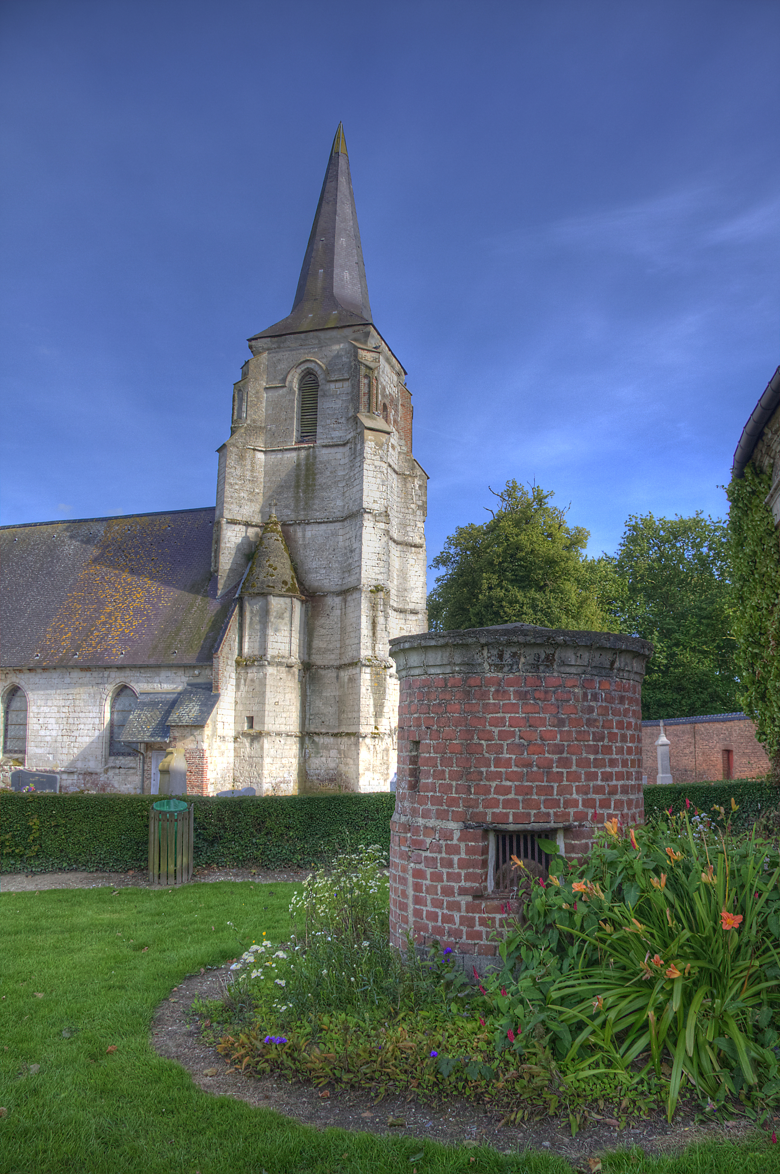 L'église de Flers (62)